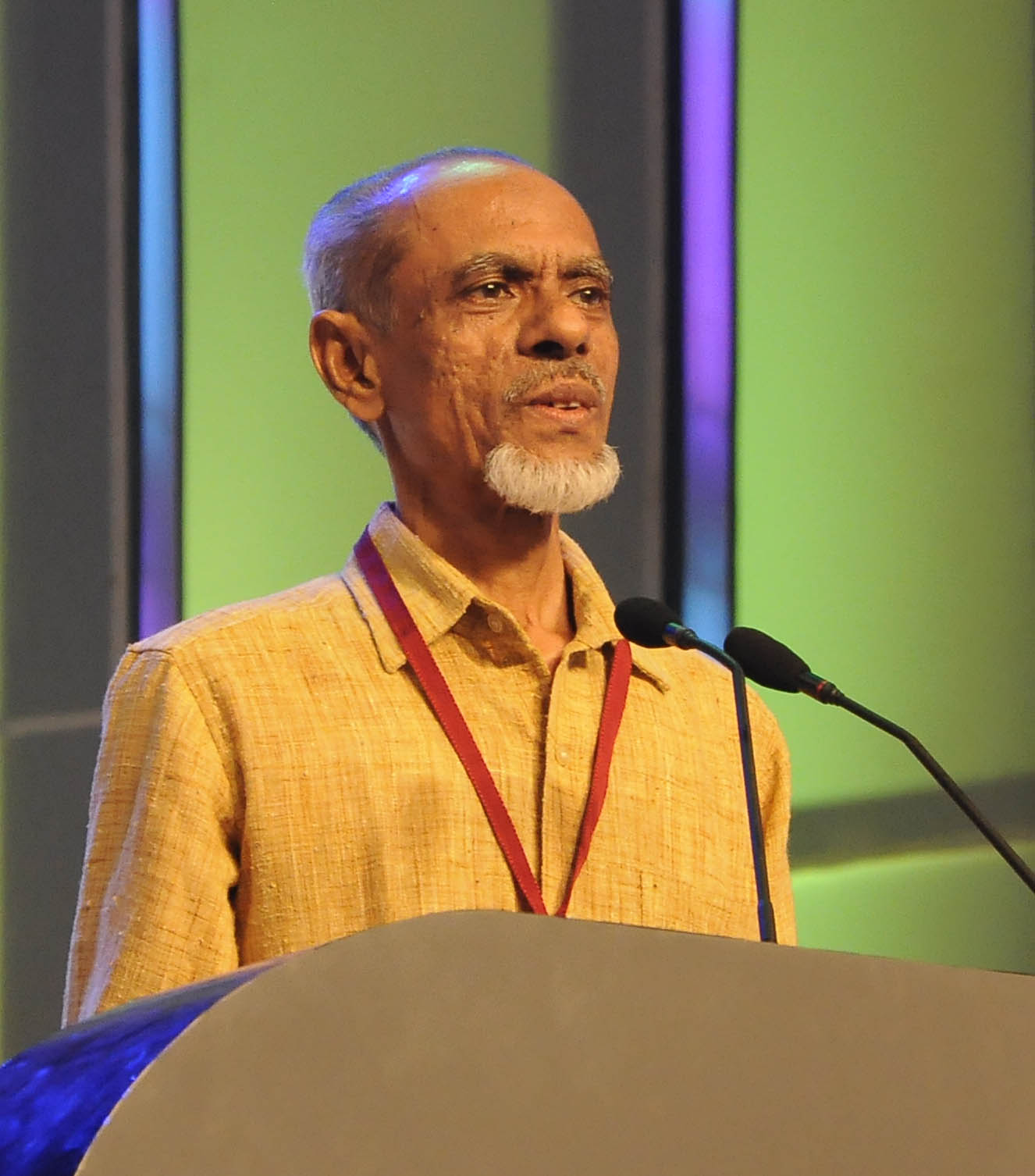 പ്രൊഫ. കെ.എ. സിദ്ദീഖ് ഹസ്സൻ